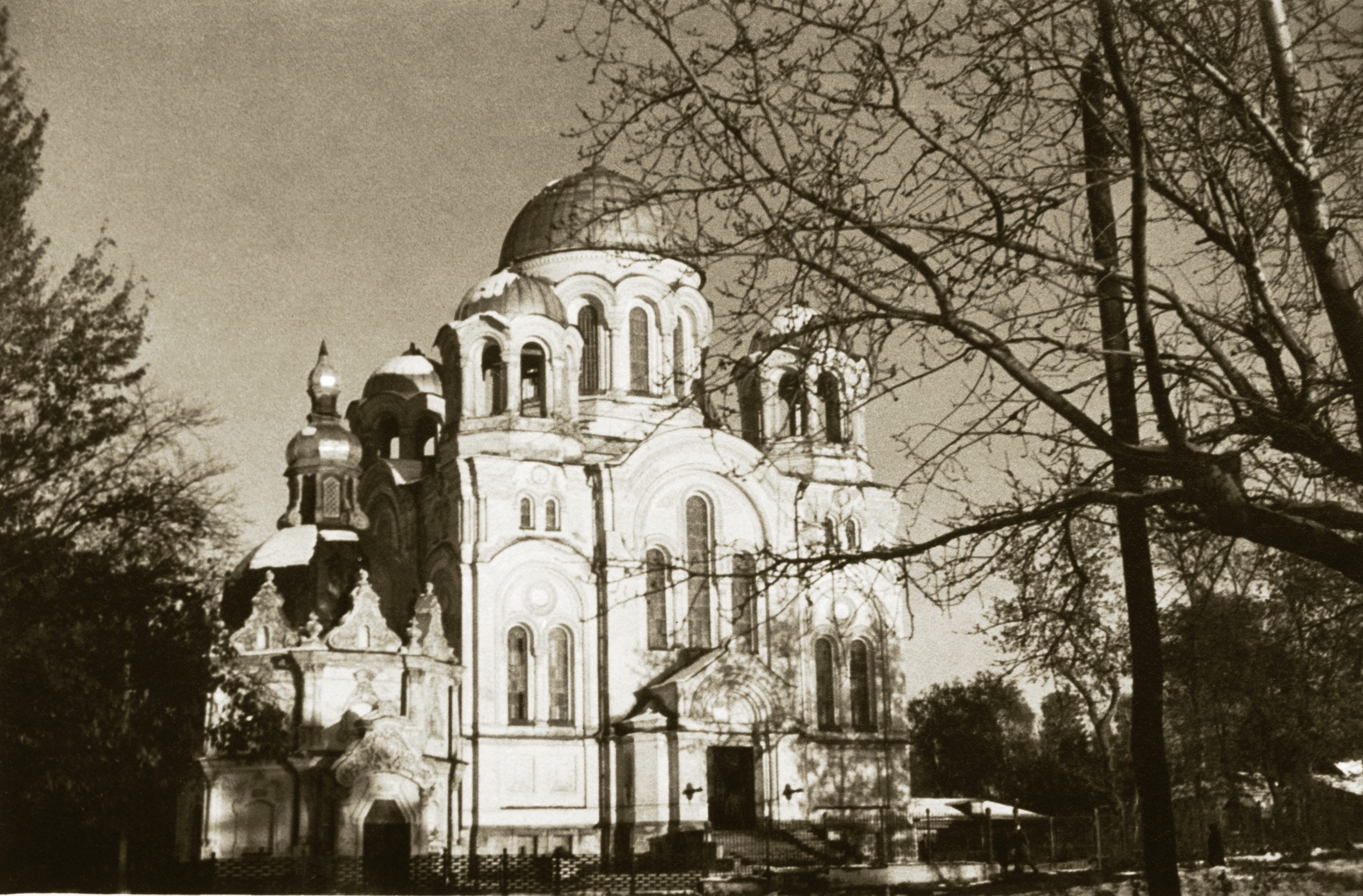 Трьоханастасіївська церква та Анастасіївська каплиця (зліва) 1949 р. Західний фасад